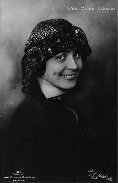 Märta Olsson-Ottoson